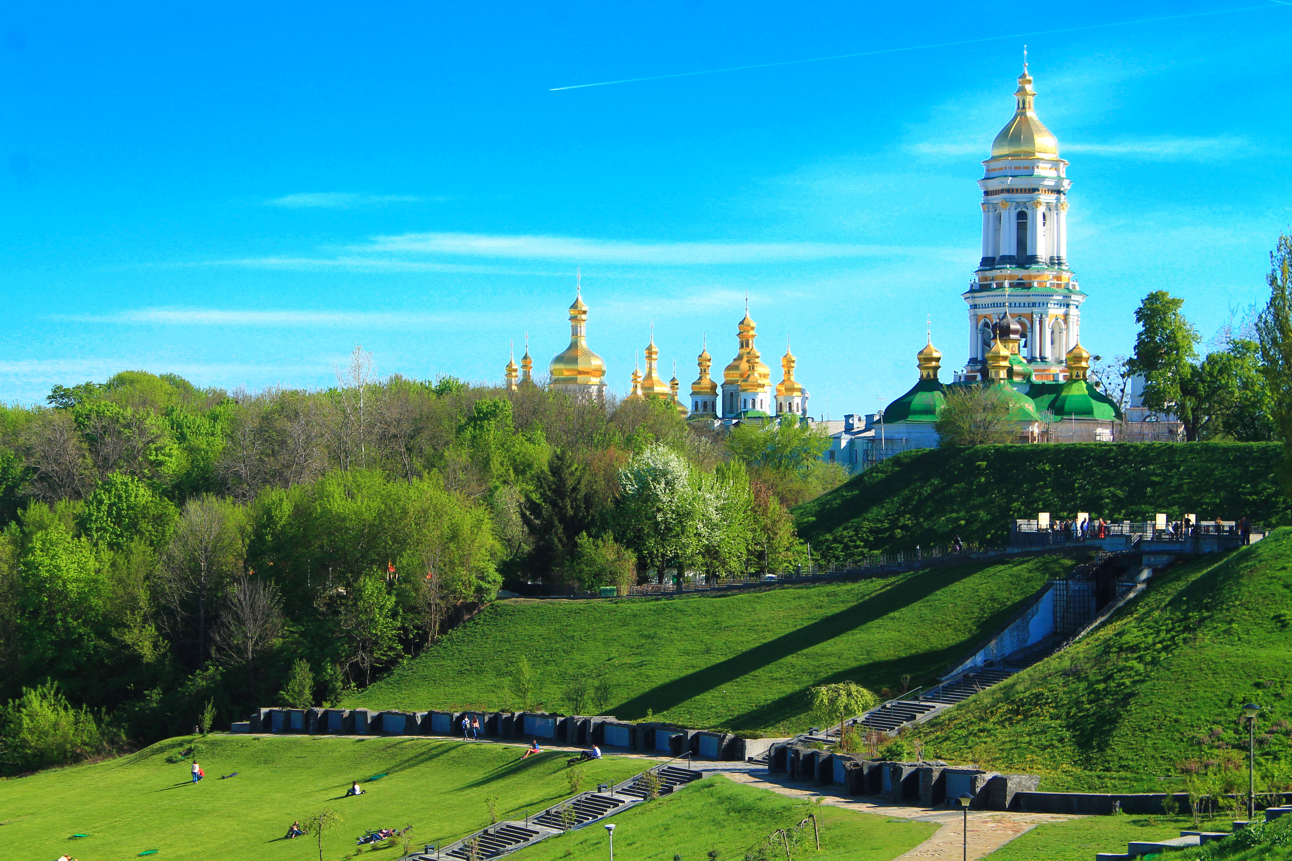 Комплекс Києво-Печерської лаври (Національний заповідник Києво-Печерська Лавра), Київ, Лаврська вул., 9